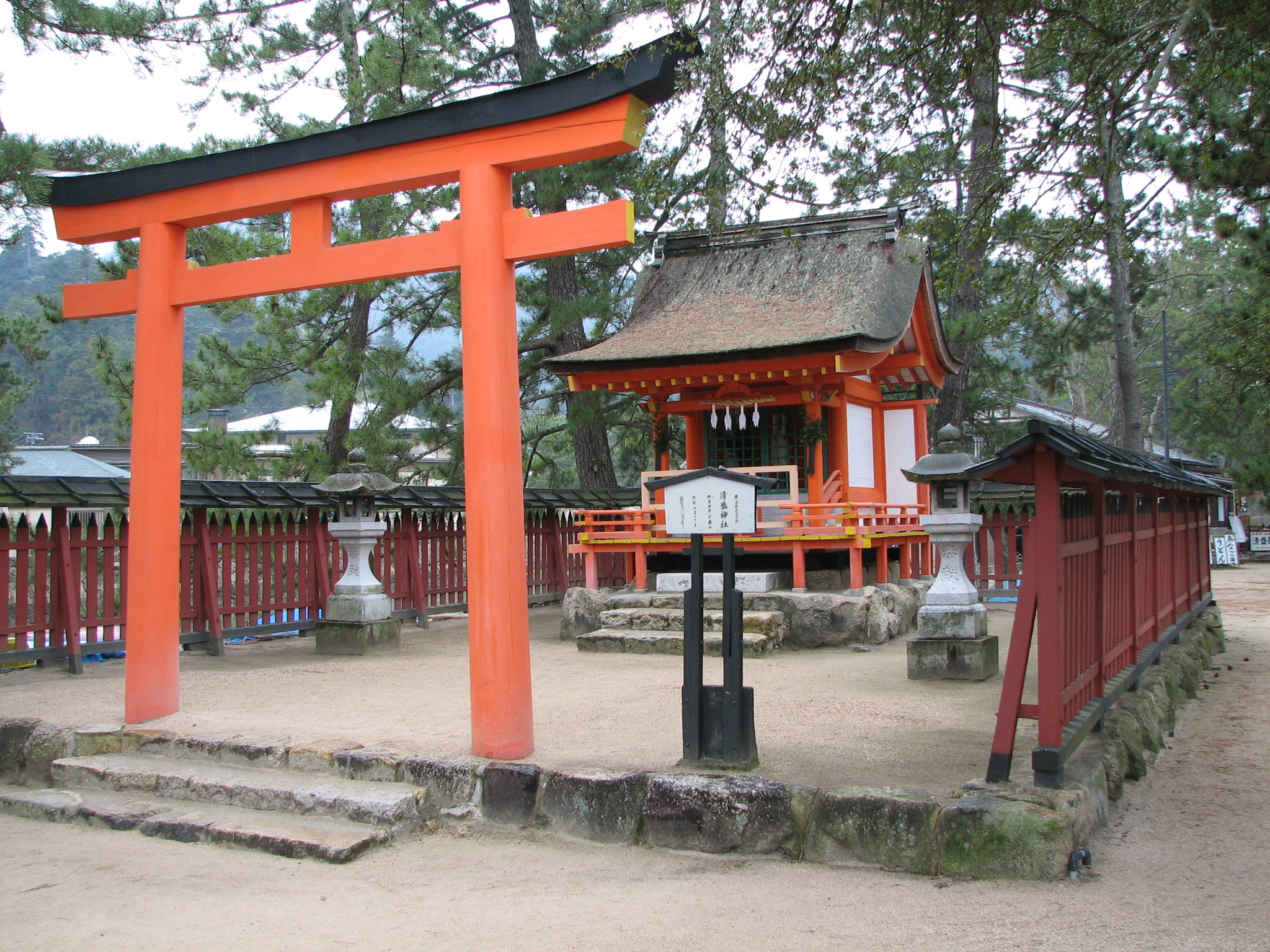 Kiyomori-jinja in Itsukushima-jinja, Miyajima, Hatsukaichi, Hiroshima, Japan 厳島神社末社 清盛神社（広島県廿日市市）